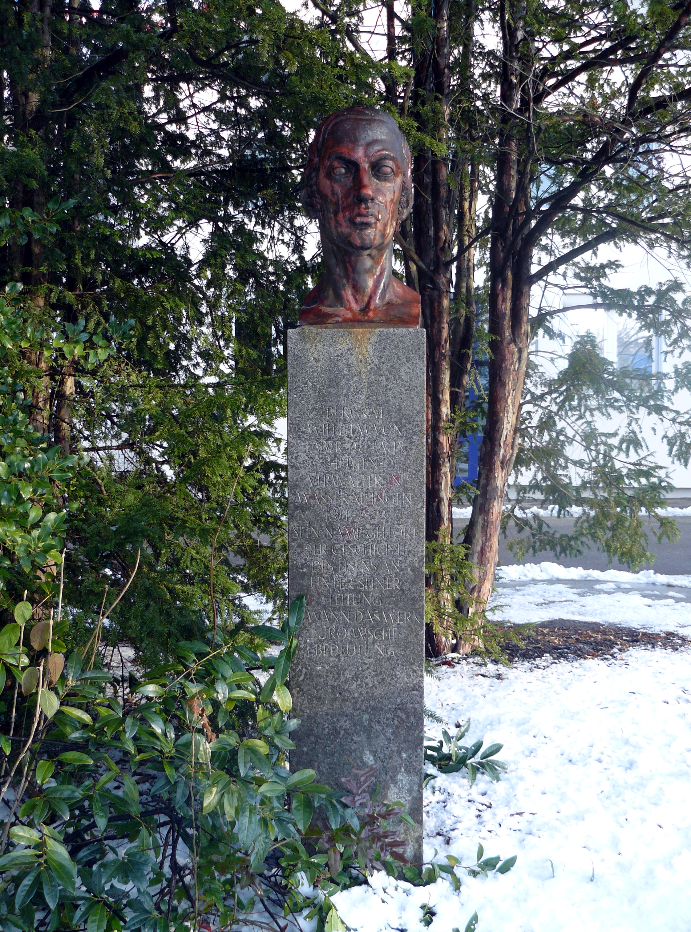 Denkmal für Wilhelm von Faber du Faur in Aalen-Wasseralfingen